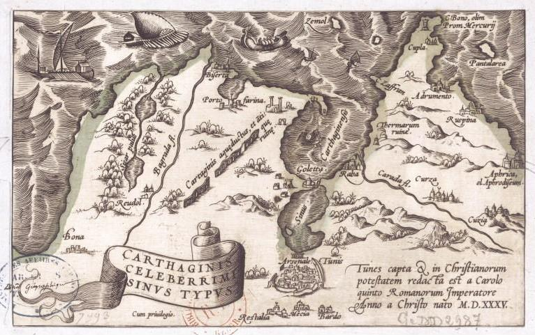 Carte du Tunis, Carthage, Lac de Tunis et le Nord de la Tunisie en 1535 (nom de la carte: Carthaginis celeberrimi sinus typus)